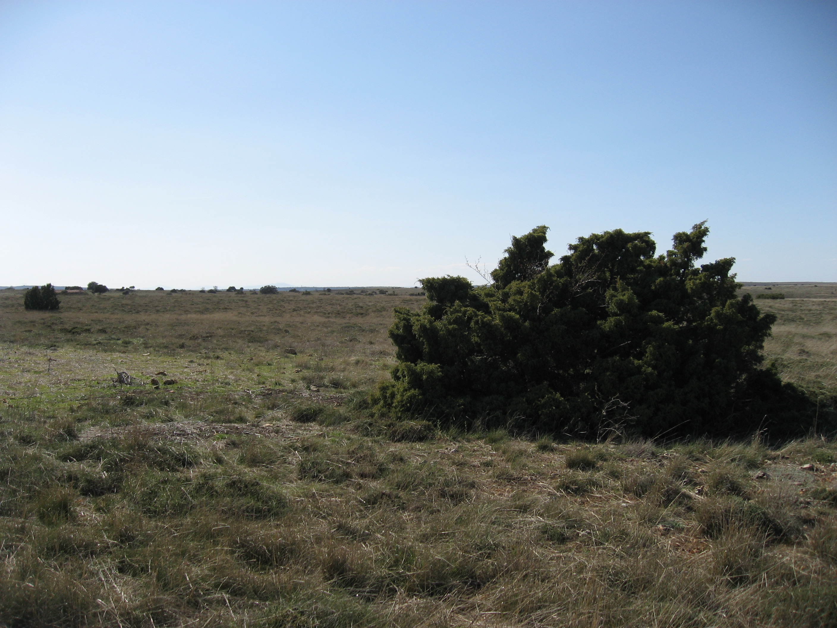 El Campo Taranz (Anguita, Guadalajara), hito cidiano y paramera de gran valor ecológico.